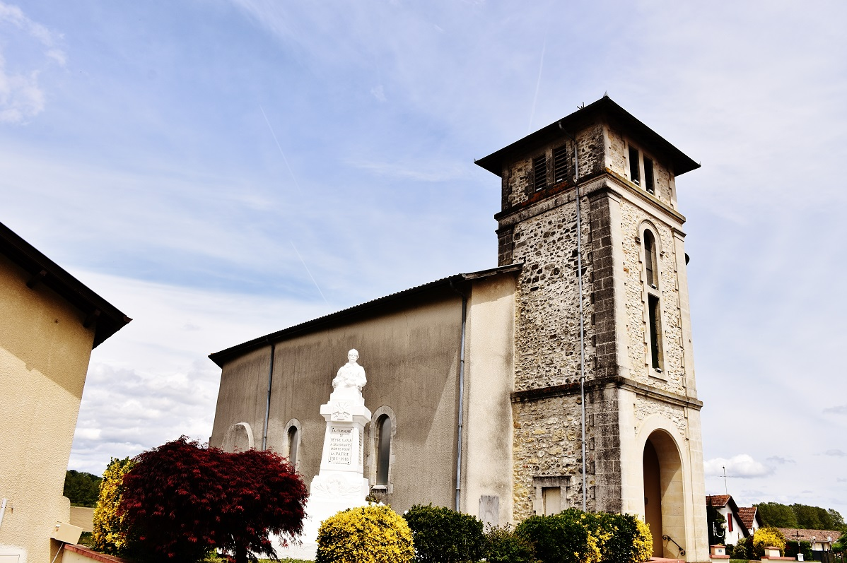 région des Landes